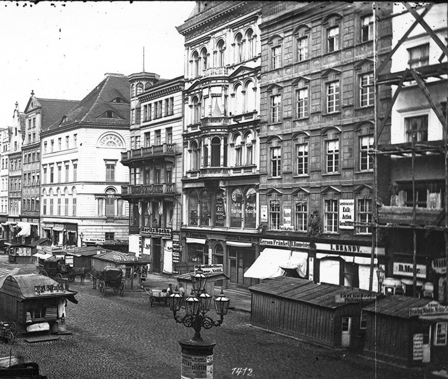 Rynek wrocławski - strona wschodnia na tzw. stronie Zielonej Trzciny, lata 1873